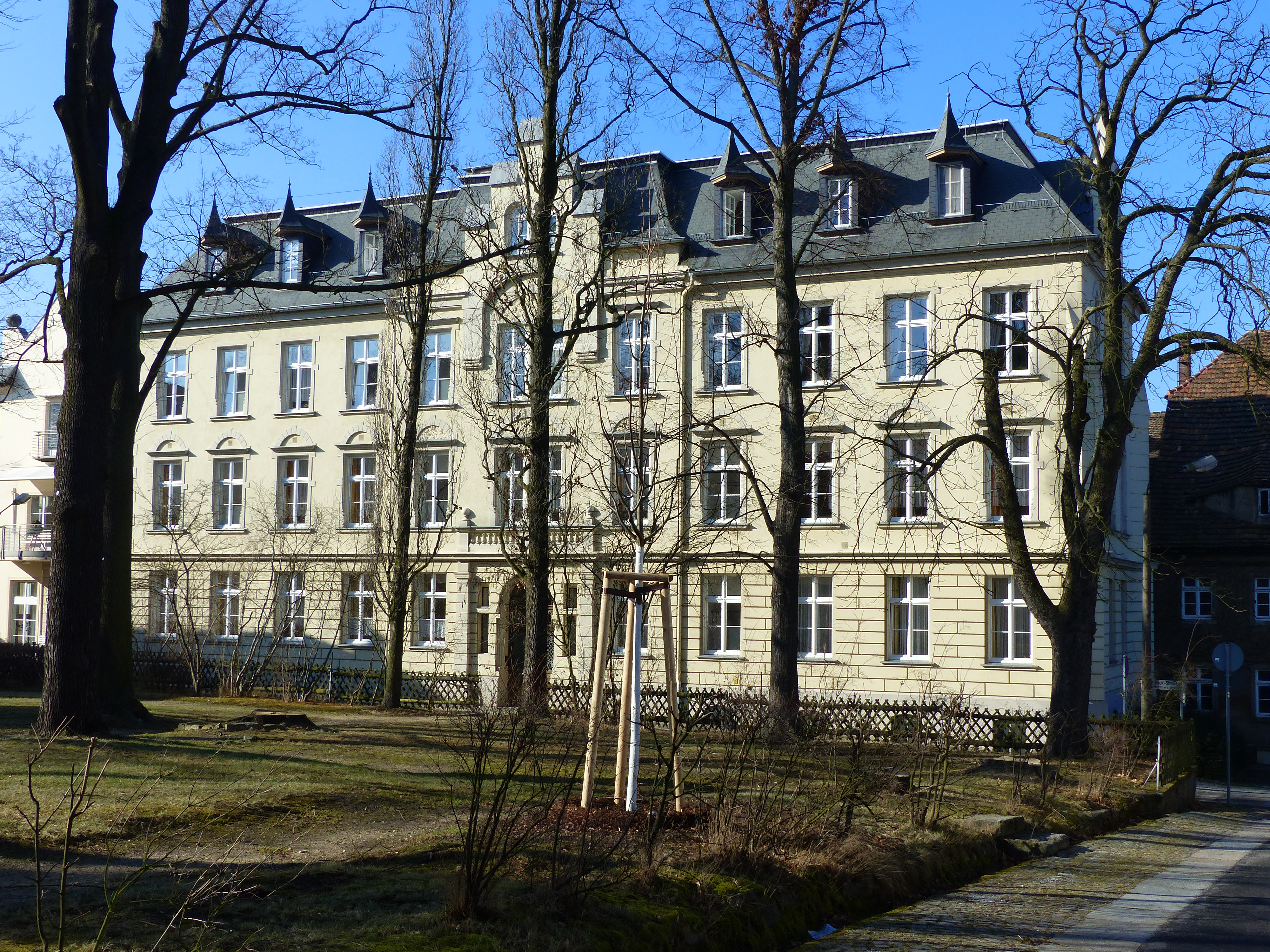 Denkmalgeschütztes Gebäude, Peter-Buck-Straße 1, Kleinwelka